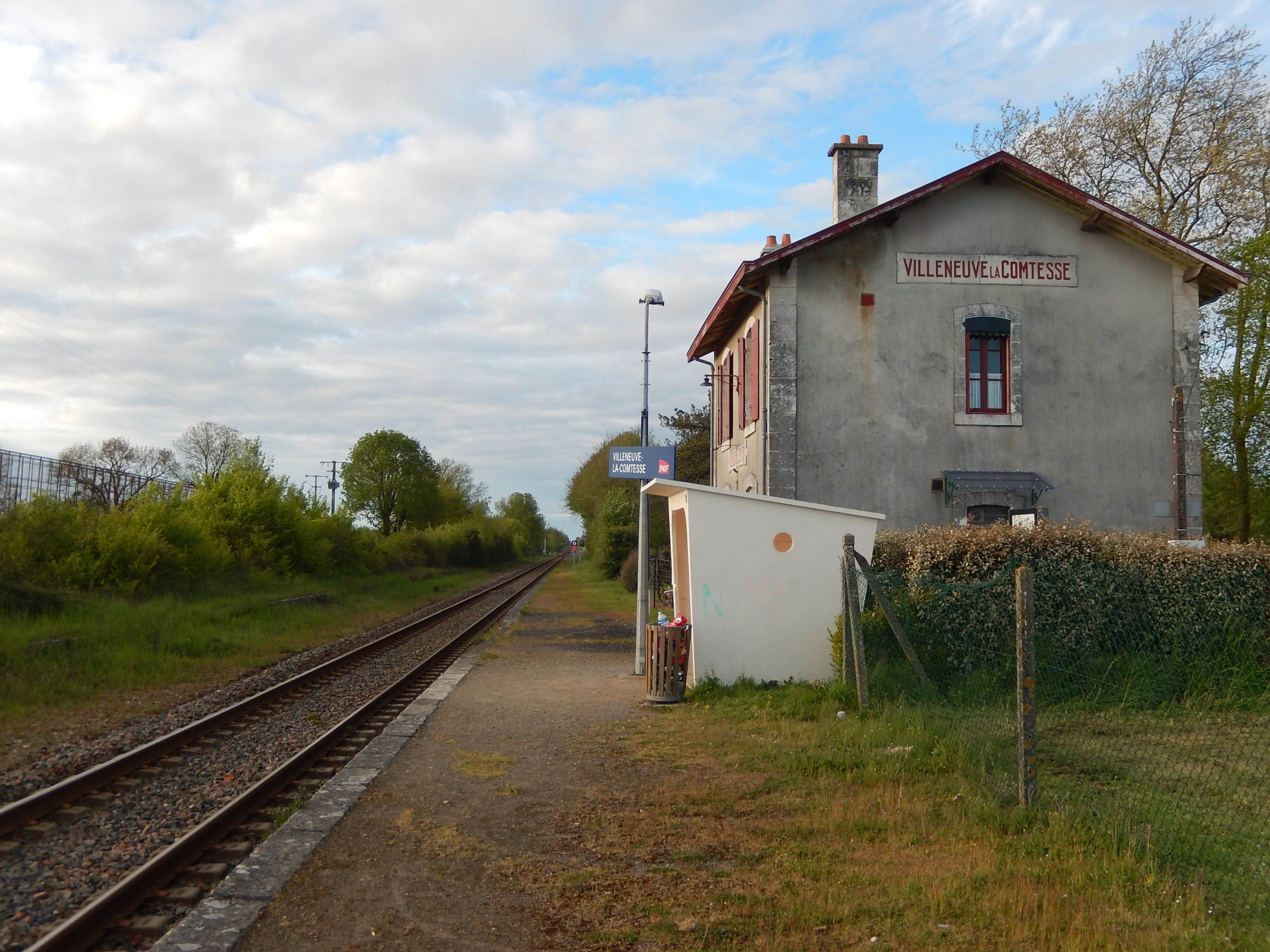 L'arrêt de train de Villeneuve-la-Comtesse (Charente-Maritime, France). Le bâtiment de la gare n'est plus ouvert aux voyageurs.